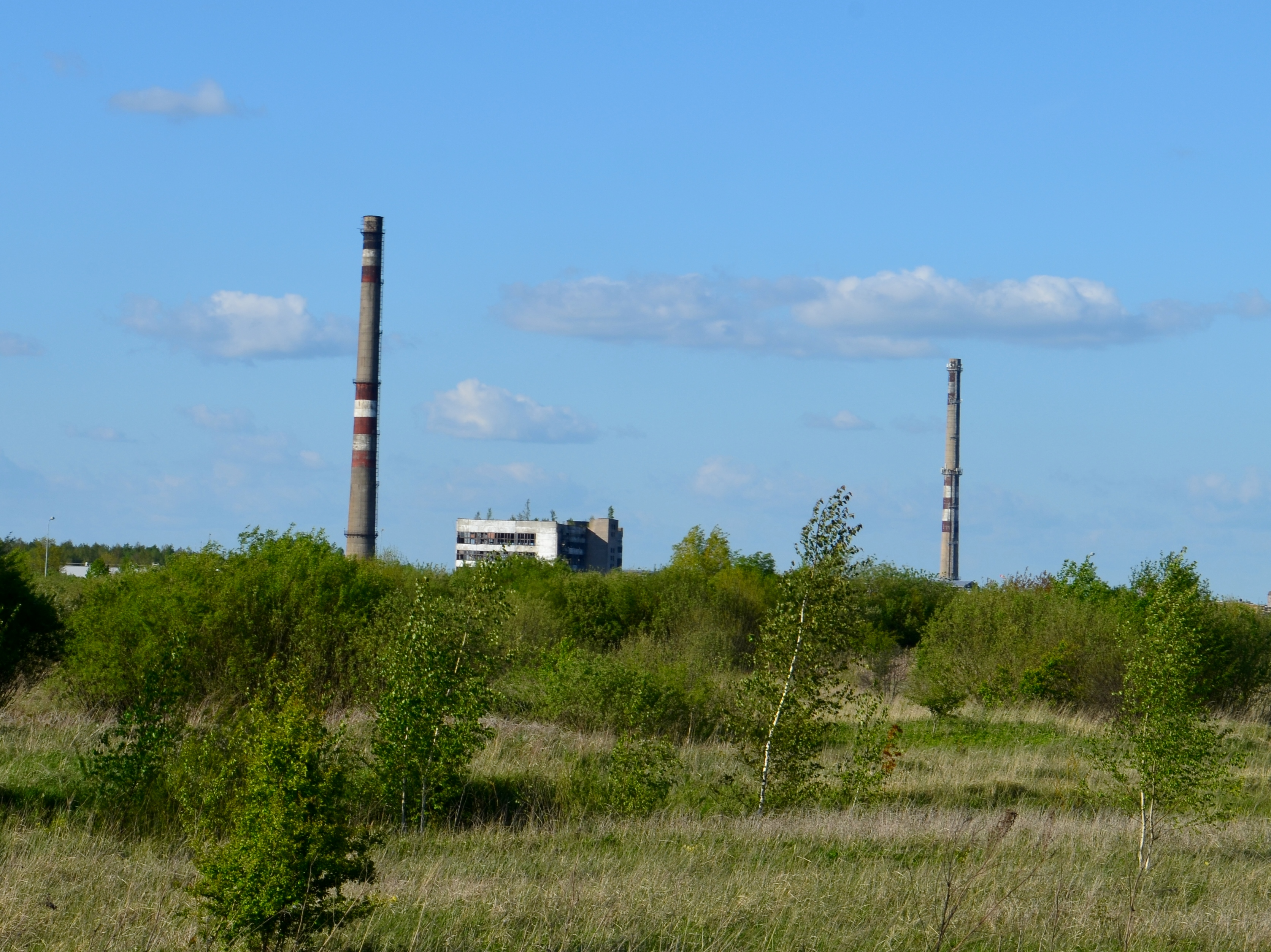 Kėdainių biochemijos gamykla